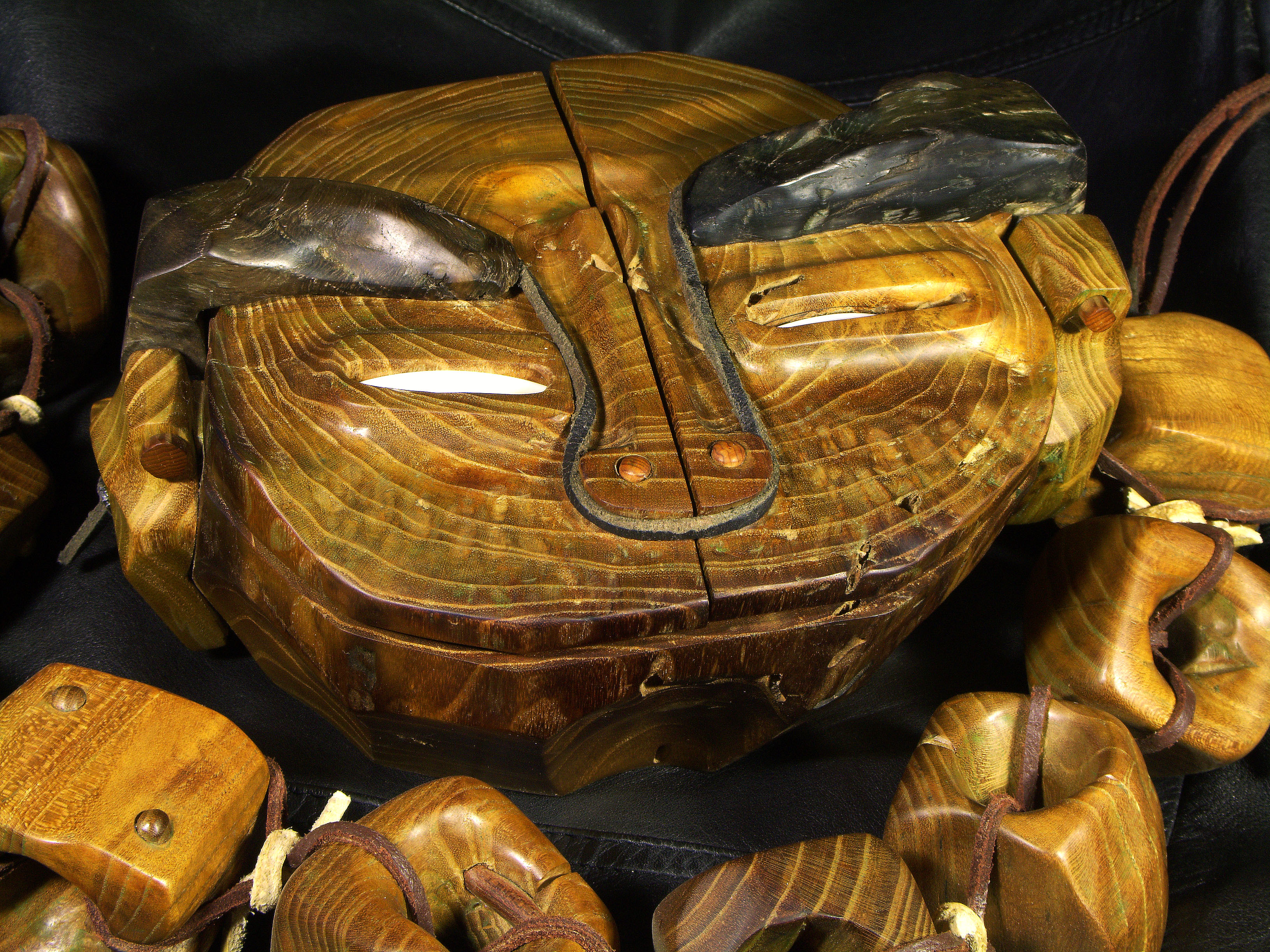 Футляр для хранения чая и чайной посуды напоминающий древнекитайскую маску.